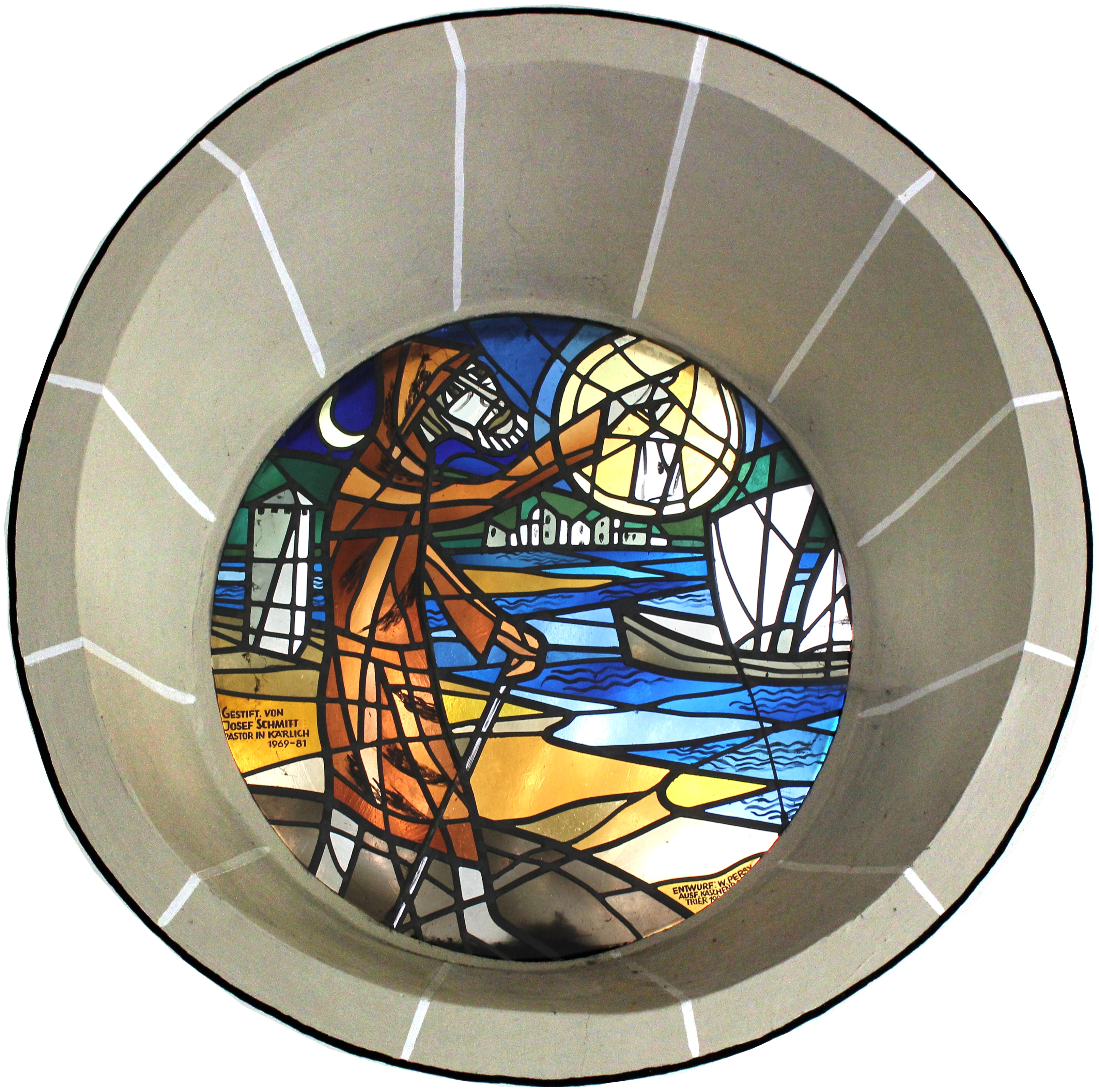 Kapelle am Guten Mann – Fenster von Werner Persy: Eremit warnt die Schiffer (Der Maler Werner Persy hat mit Schreiben vom 19. Oktober 2009 die Genehmigung zur Veröffentlichung des Bildes unter CC-BY-SA-Lizenz erteilt.)